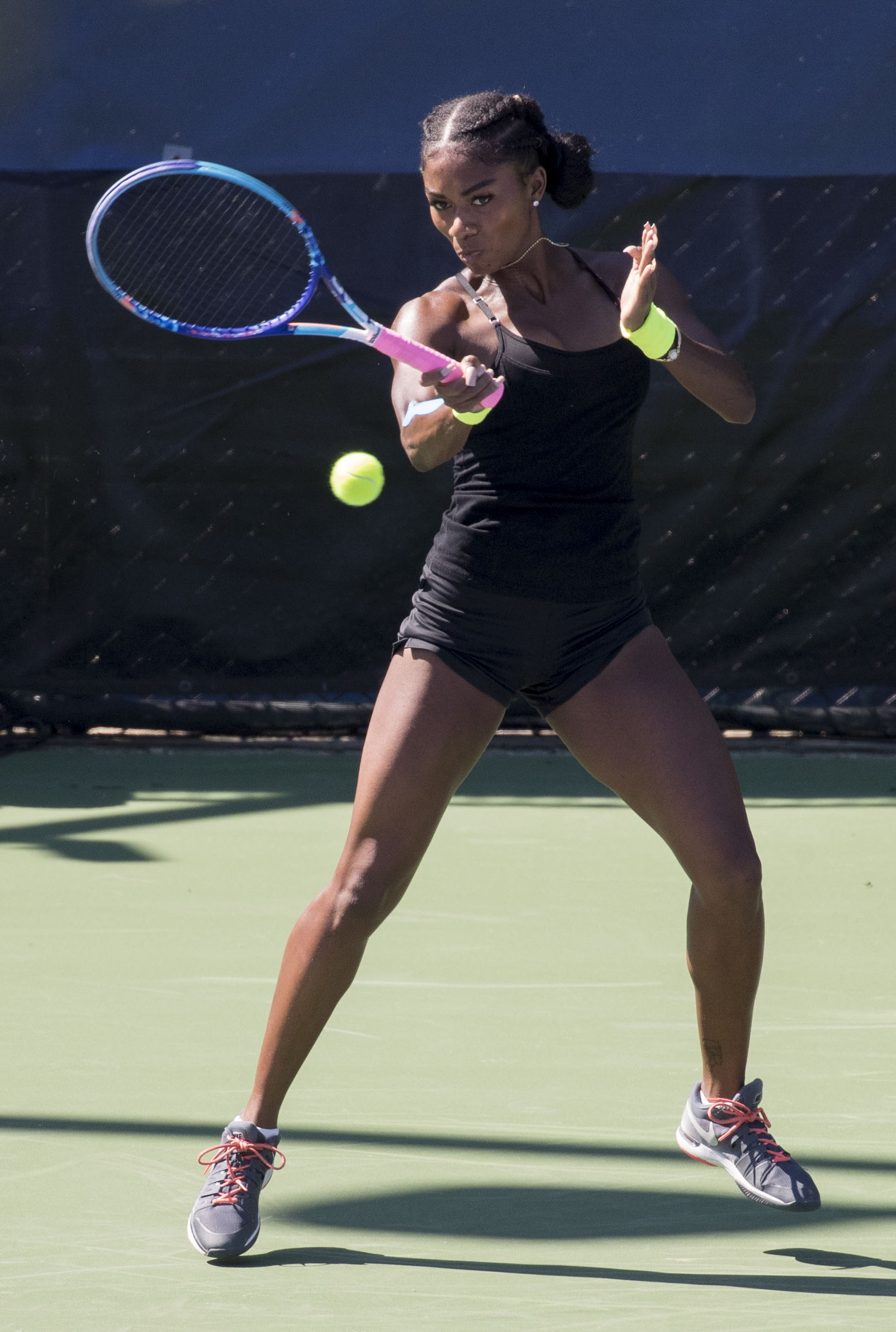 Citi Open Tennis 2017